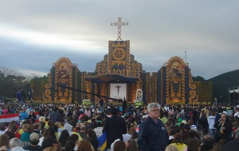 Vista frontal del retablo hecho de maíz, calabazas y cocos, elaborado por el artista plástico paraguayo Koki Ruiz y equipo de colaboradores. El altar sirvió de escenario para la misa central del Papa Francisco el domingo 12 de julio de 2015, en Ñu Guasú, Luque, Paraguay.